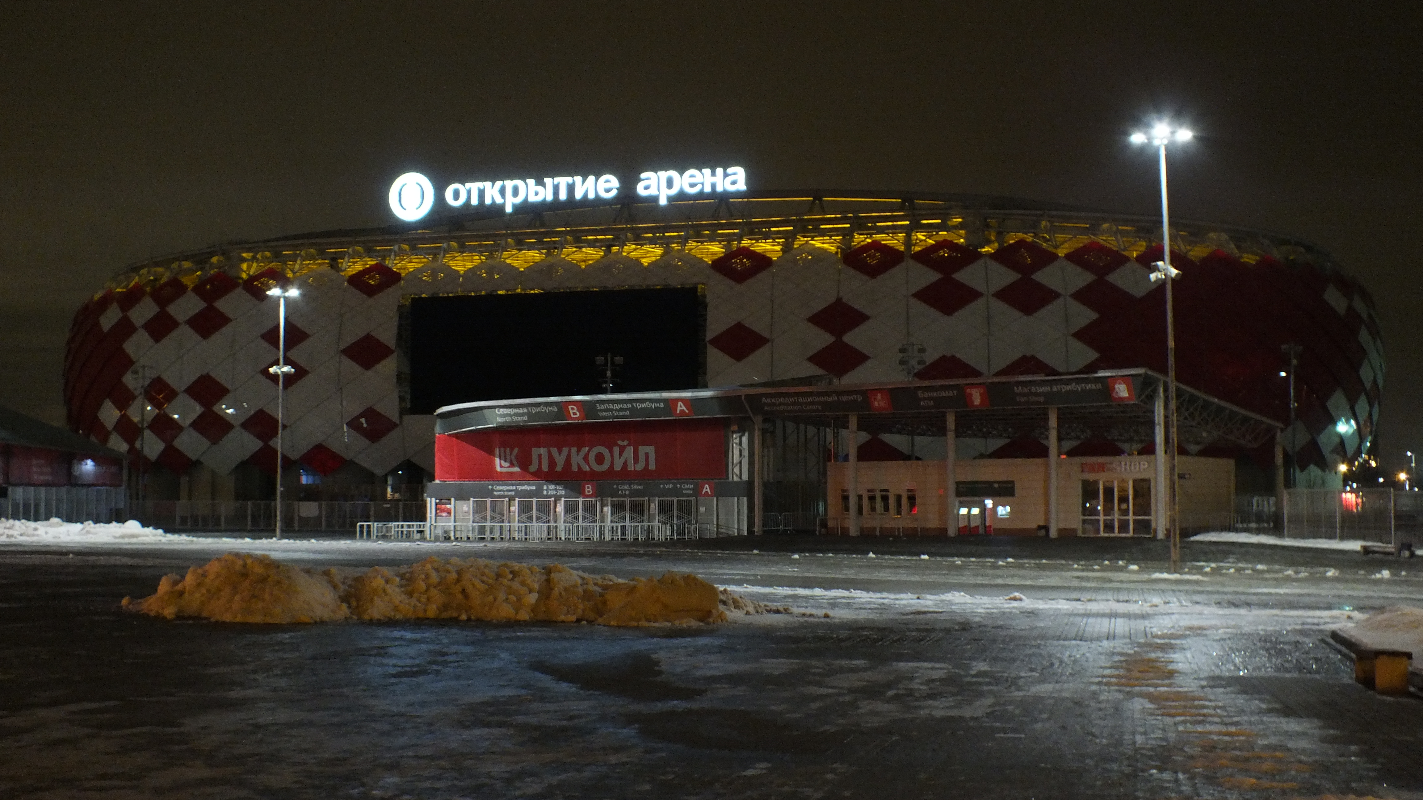 Стадион «Открытие Арена» ночью 2 января